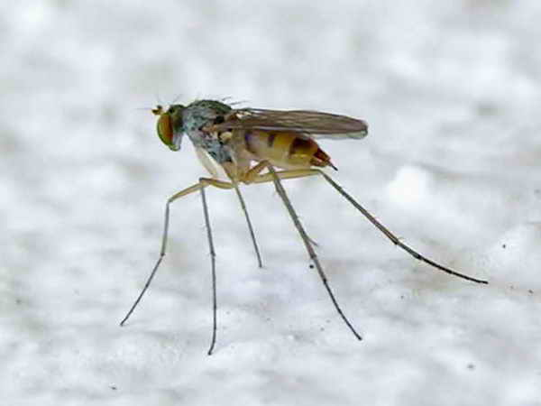 Foto tirada cunha Nikon E8800. Self made Castiñeiras - Ribeira - Galicia - Spain